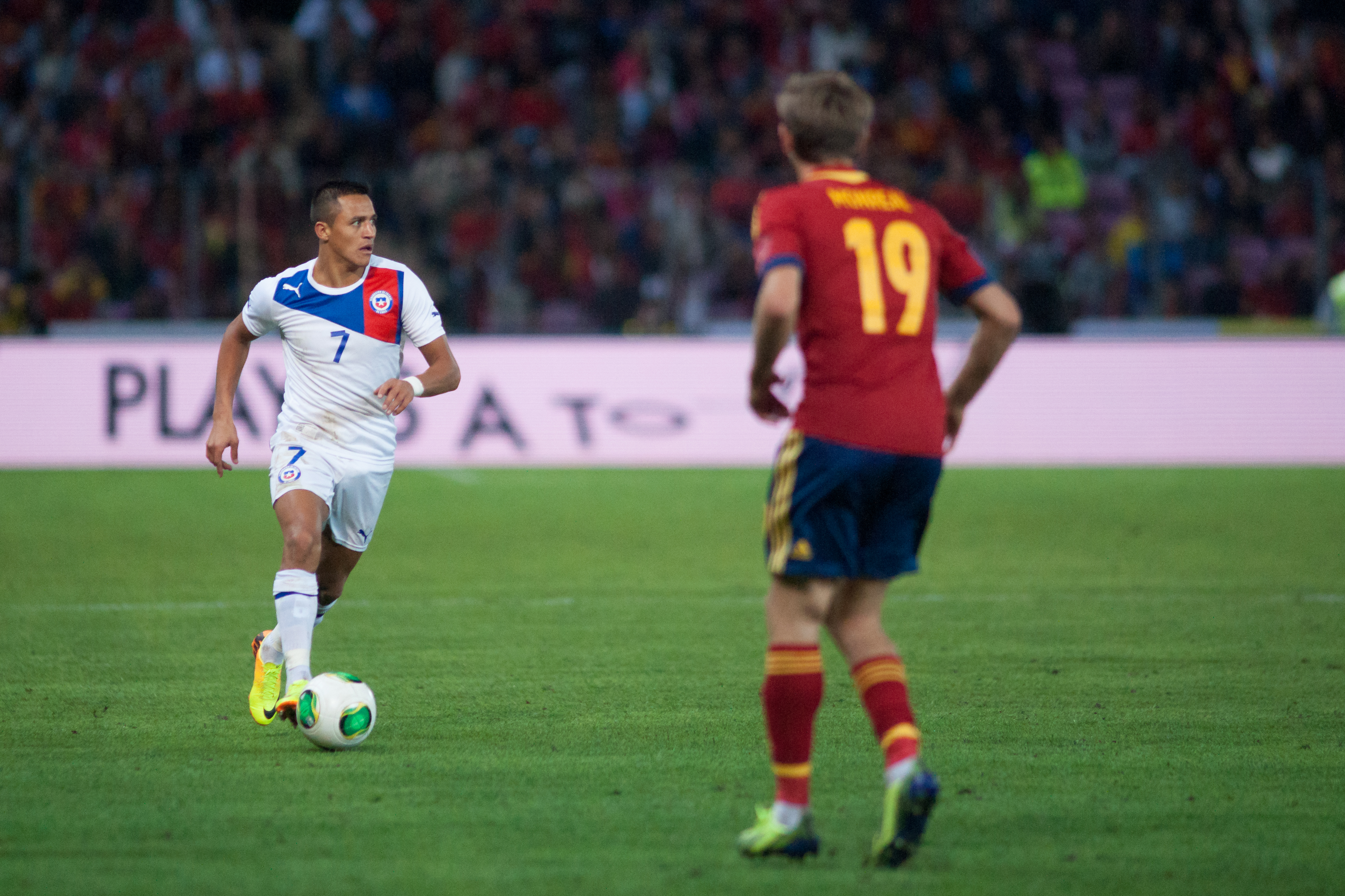 Espagne - Chili, 10 septembre 2013.